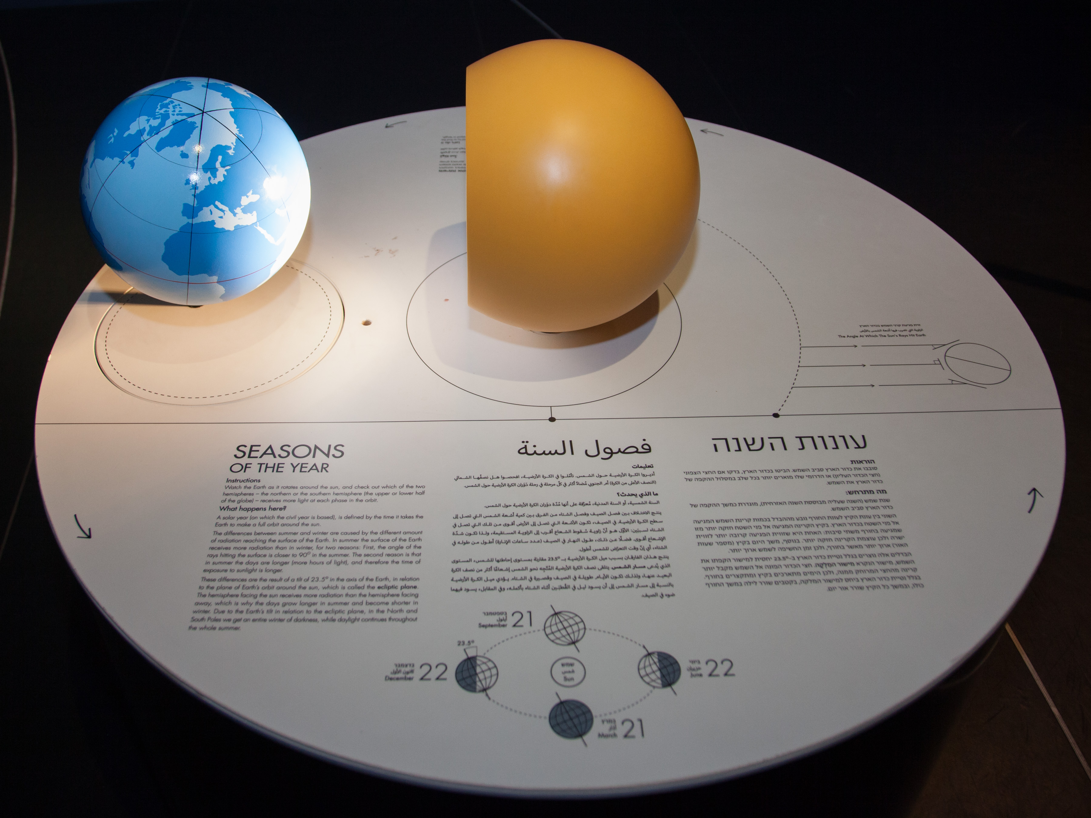 מוצג המדגים את חילופי עונות השנה בכדור הארץ בשל שינוי זוית כדור הארץ ביחס לשמש במהלך השנה. המוצג ניצב בתערוכת מבט אל השמים במדעטק.